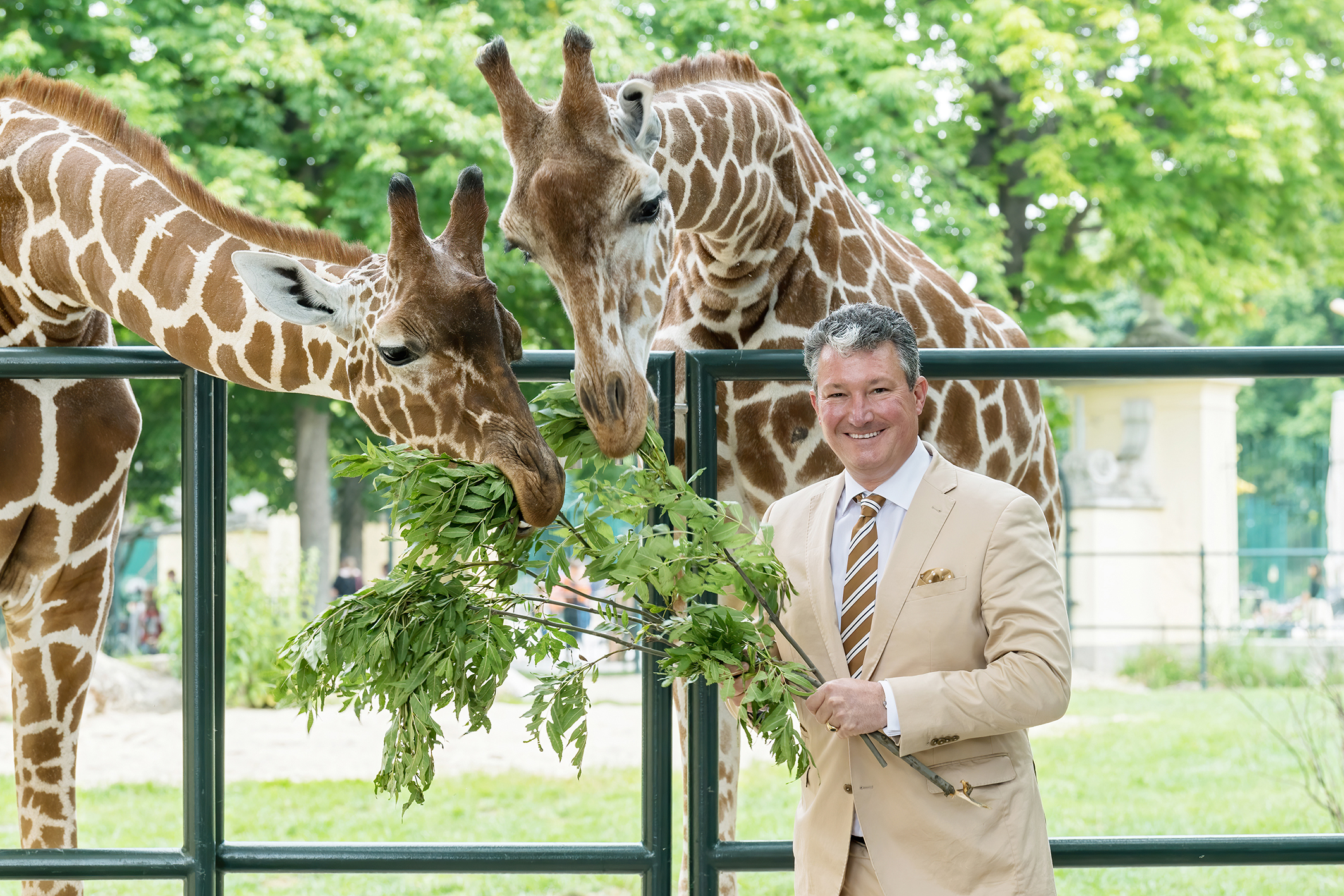 Dr. Stephan Hering-Hagenbeck Depicted person: Stephan Hering-Hagenbeck – German zoologist